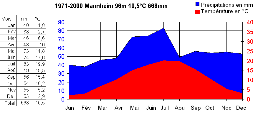 Precipitations and temperatures in Mannheim (Germany) / Précipitations et températures à Mannheim (Allemagne) / Niederschalg und Temperatur in Mannheim (Deutschland)